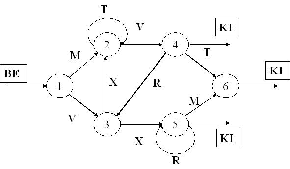 Mesterségesnyelvtan-elsajátítás (Véges állapotú nyelvtan)